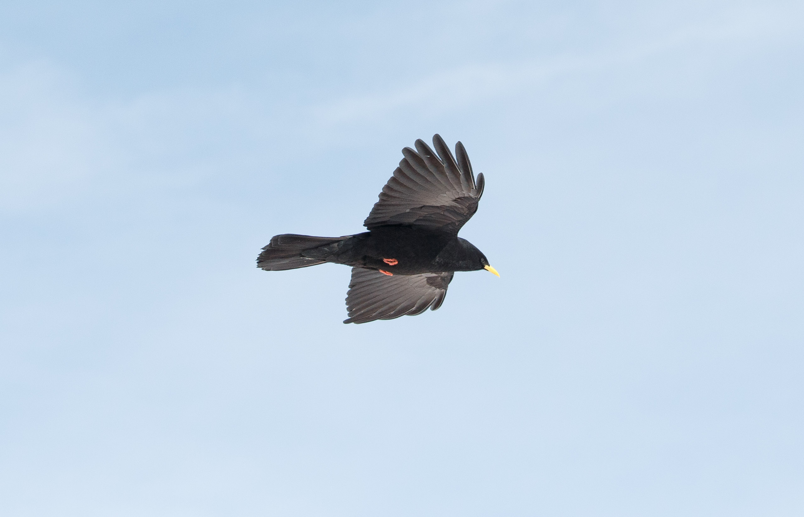 Chocard à bec jaune (Pyrrhocorax graculus).